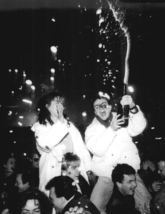 Berlin, Neujahrsfest ADN-ZB Reiche 1.1.90 Berlin: Brandenburger Tor- Silvesterfeier- Ausgelassene Volksfeststimmung herrschte rund um das Brandenburger Tor, wo Hunderttausende ins neue Jahr hineinfeierten. Den Sekt hatte man allerdings selbst mitbringen müssen.